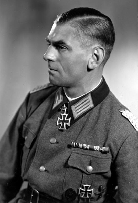 Ritterkreuzträger Major Pannier Berlin, 22.5.42